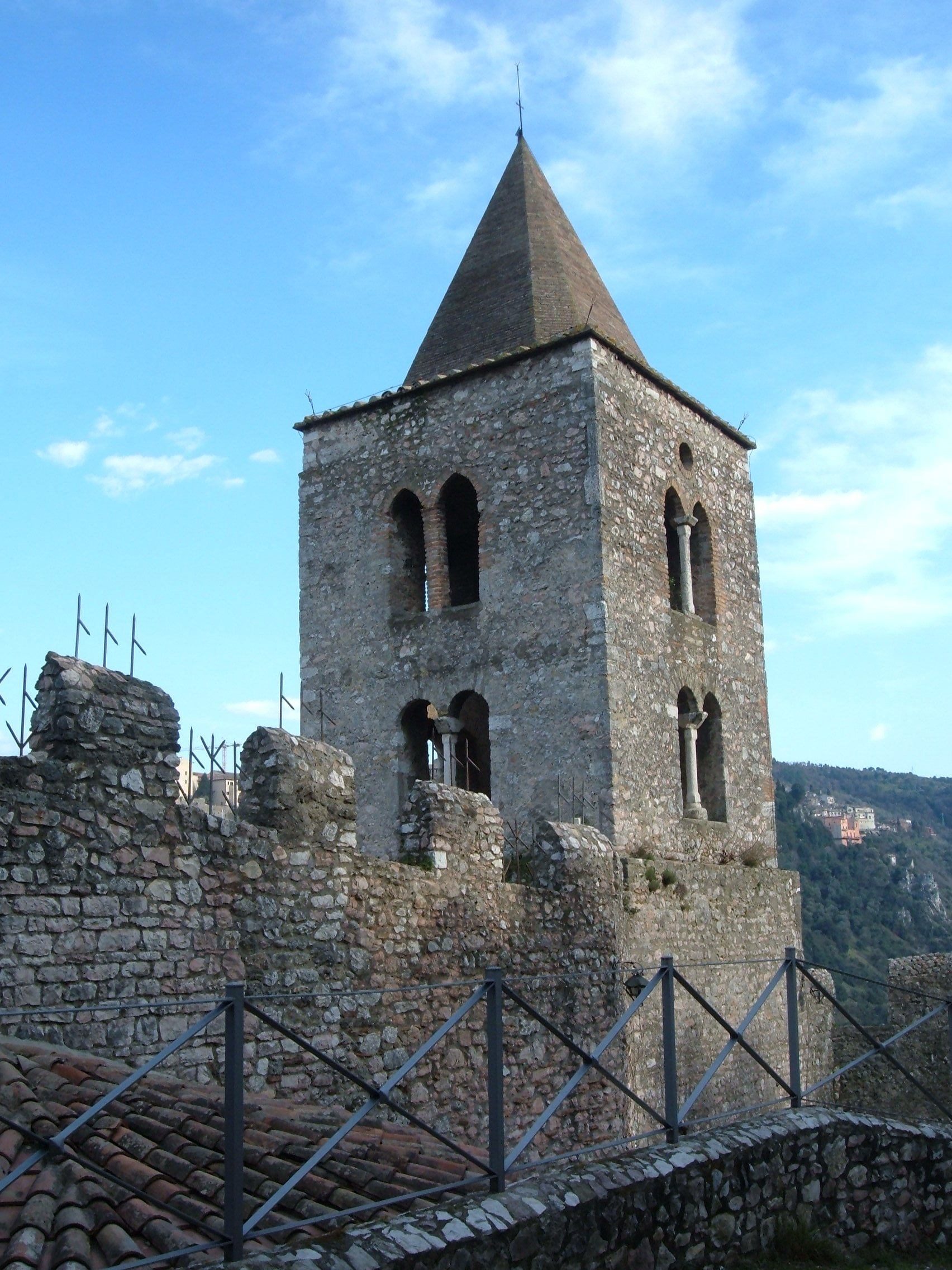 Abbazia di San Cassiano, a Narni. Campanile della chiesa.